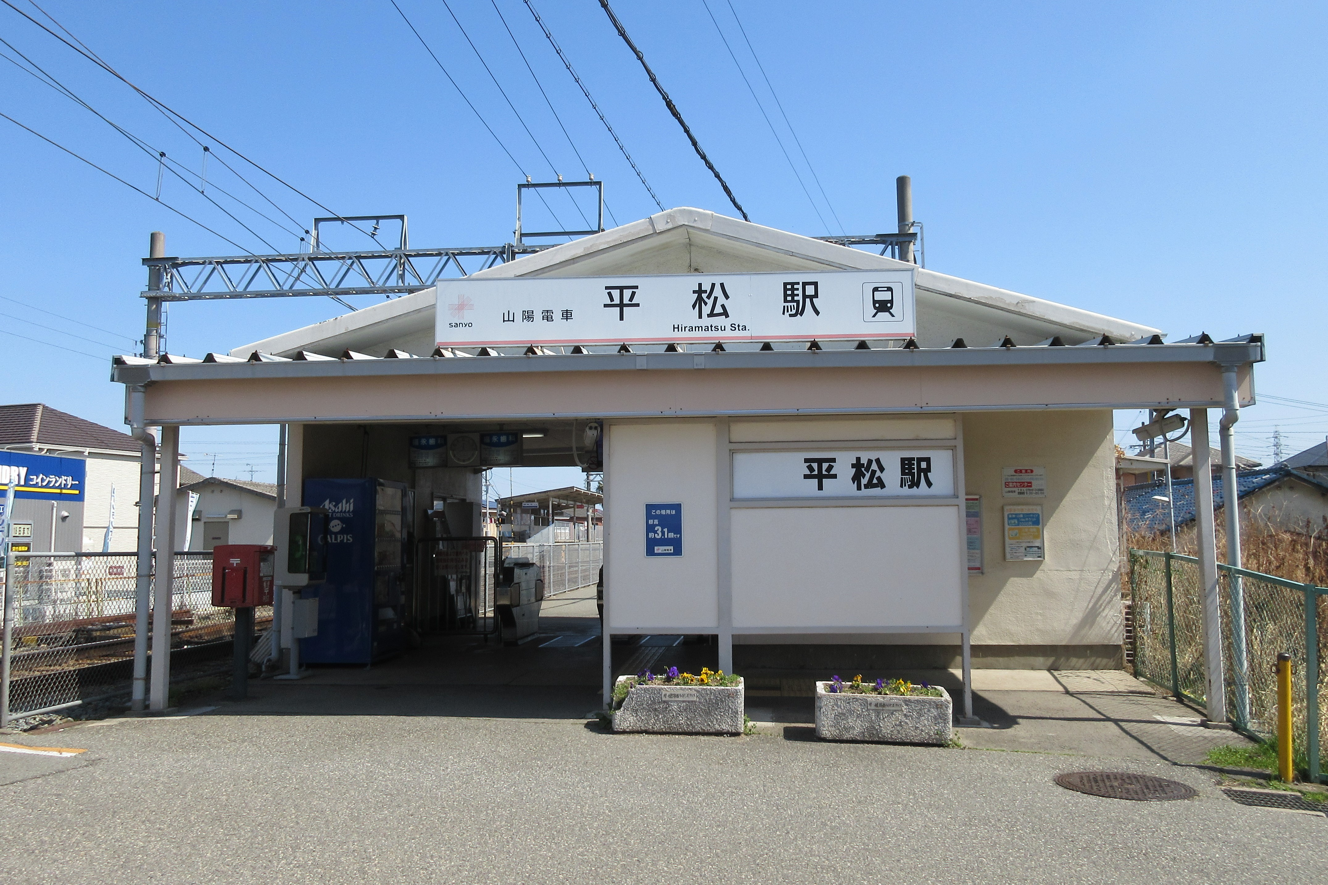 山陽電鉄平松駅